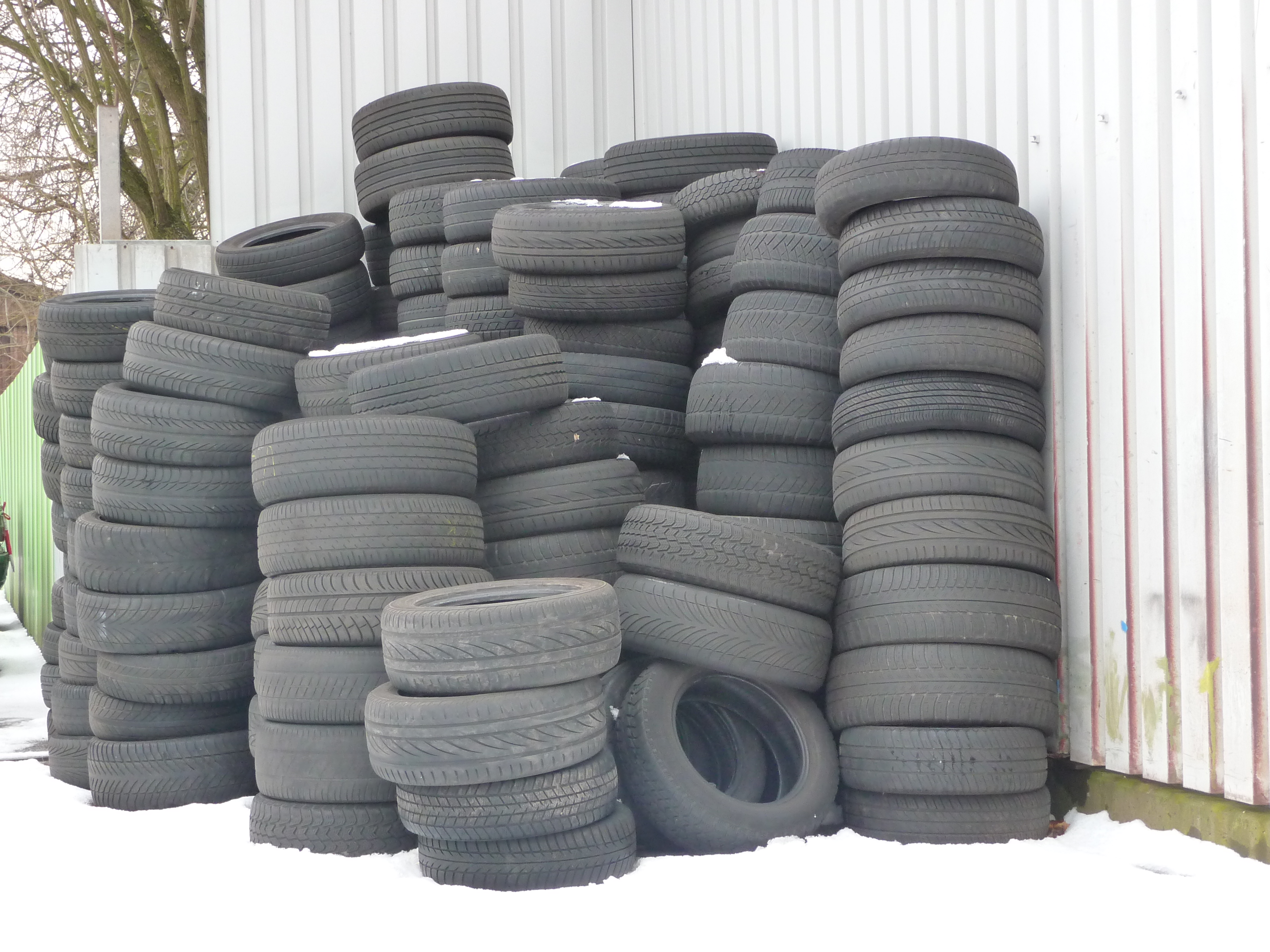 Stapel Altreifen